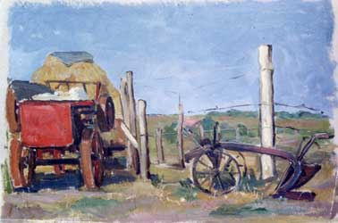 Carlo Ludovico Bompiani - La trebbia In qualità di erede del diritto d'autore dell'opera e di autore della fotografia, autorizzo la diffusione di questa immagine purché sia contestualmente citato il nome del pittore. Spino 20:41, Nov 16, 2004 (UTC) Categoria:Immagini d'arte italiana